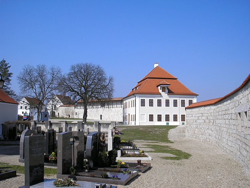 Burg Vohburg (Oberbayern). Das Pflegschloss an der Ringmauer.